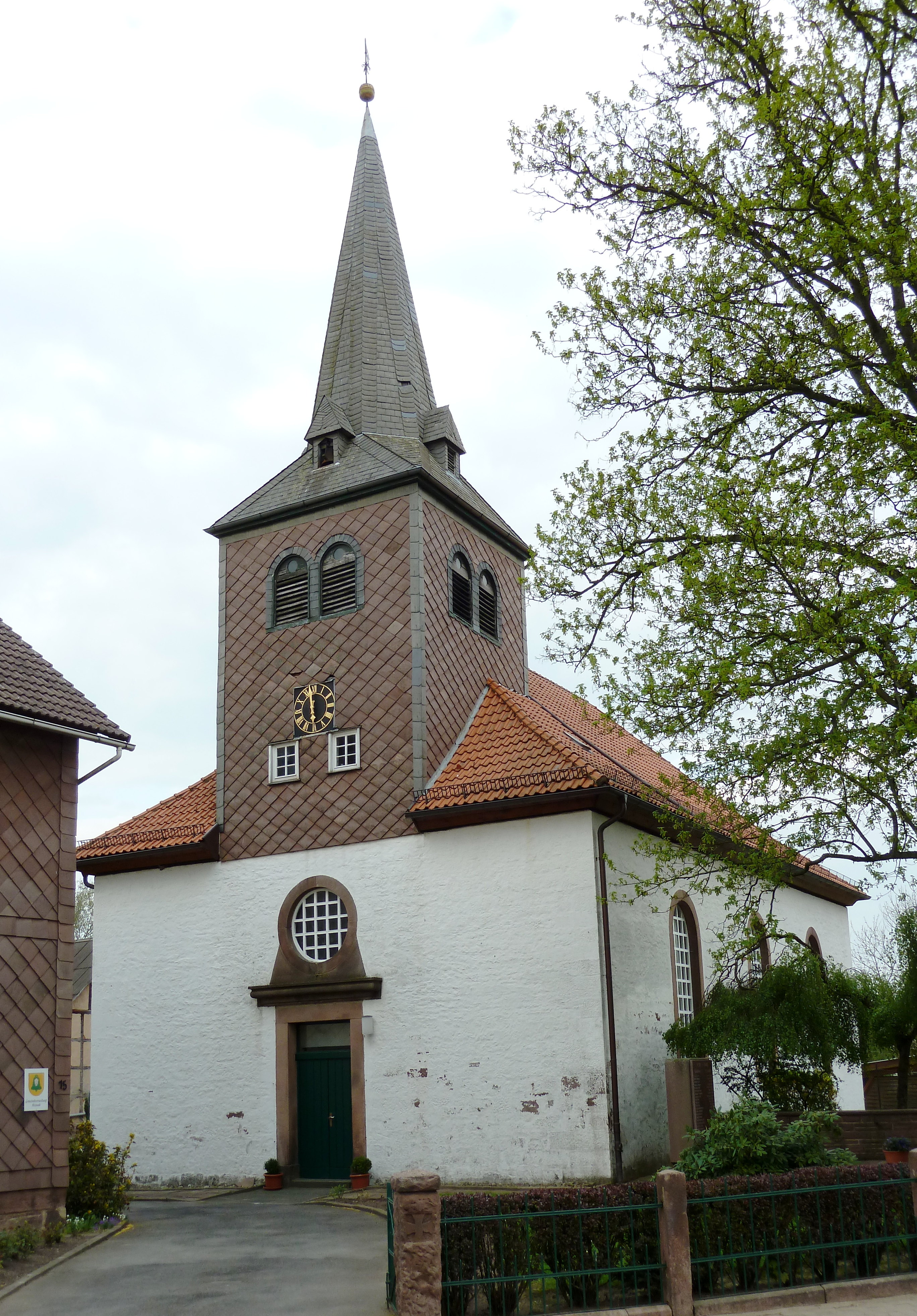 Ev.-luth. Heilig-Kreuz-Kirche in Heinade, Landkreis Holzminden